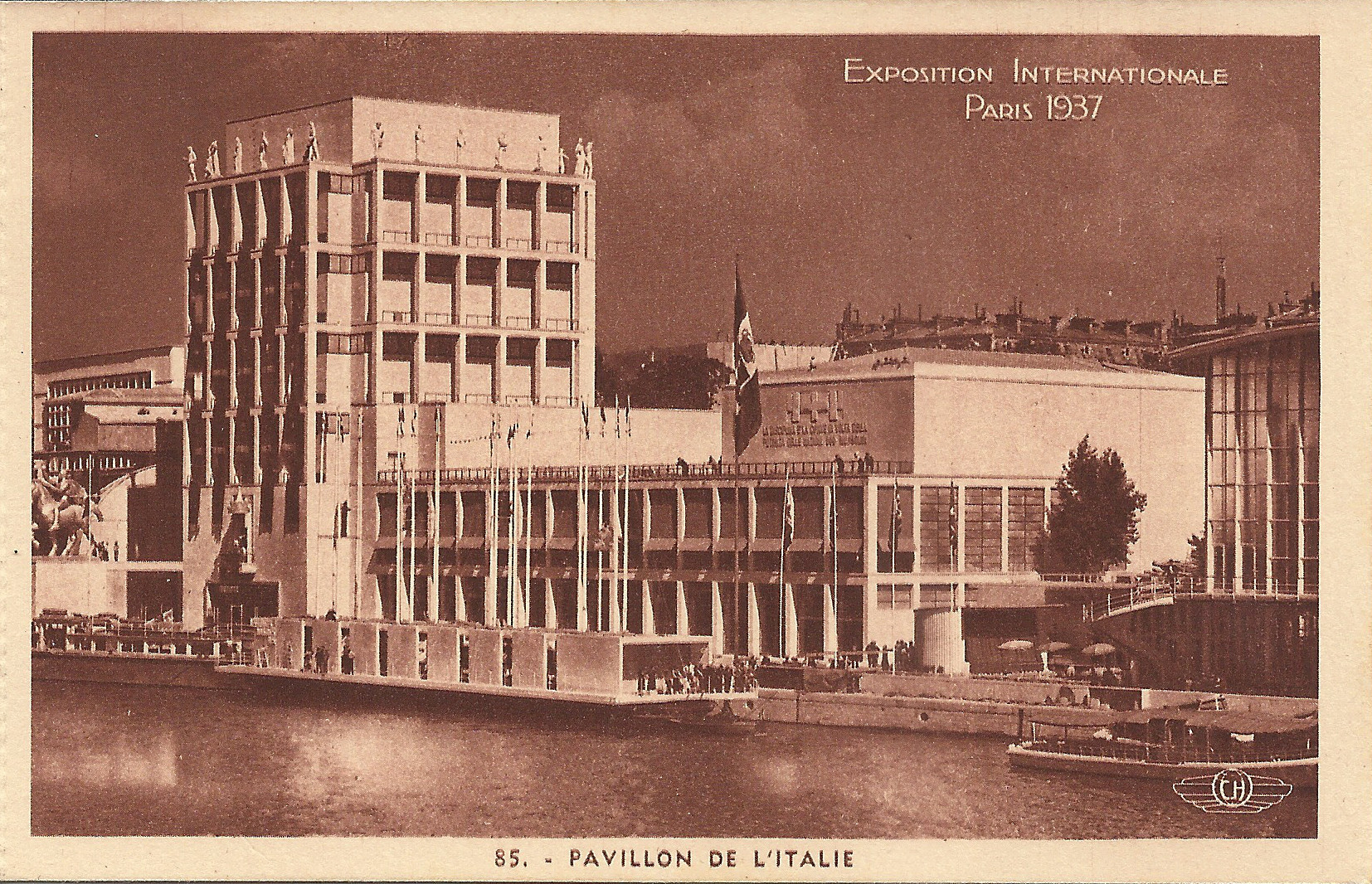 Carte postale de l'Exposition internationale de Paris en 1937